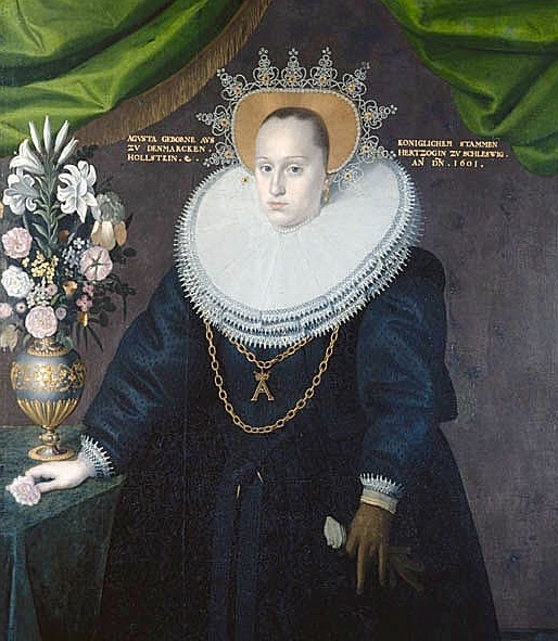 Augusta af Danmark, maleri fra 1601, Gripsholm Slot